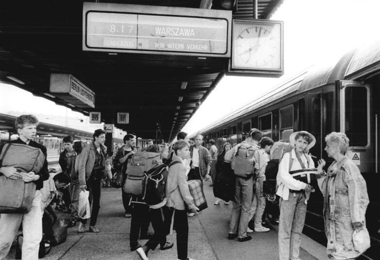 ADN-ZB-Senft-2.7.89-fd-Berlin: Sonderzug- "Fahrt frei" hieß es am 2. Juli für den ersten Sonderzug mit Ferienkindern auf dem Weg nach Polen. Der Sommerferienaustausch 1989 ist angelaufen - insgesamt 300.000 Kinder und Jugendliche beider Staaten werden auf der Grundlage des 1988 vereinbarten Freundschaftswerkes DDR-Polen ins Nachbarland reisen."